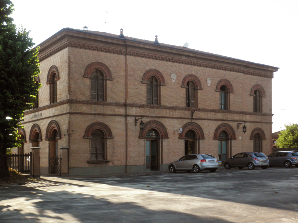 Stazione ferroviaria di Castelvetro Piacentino.